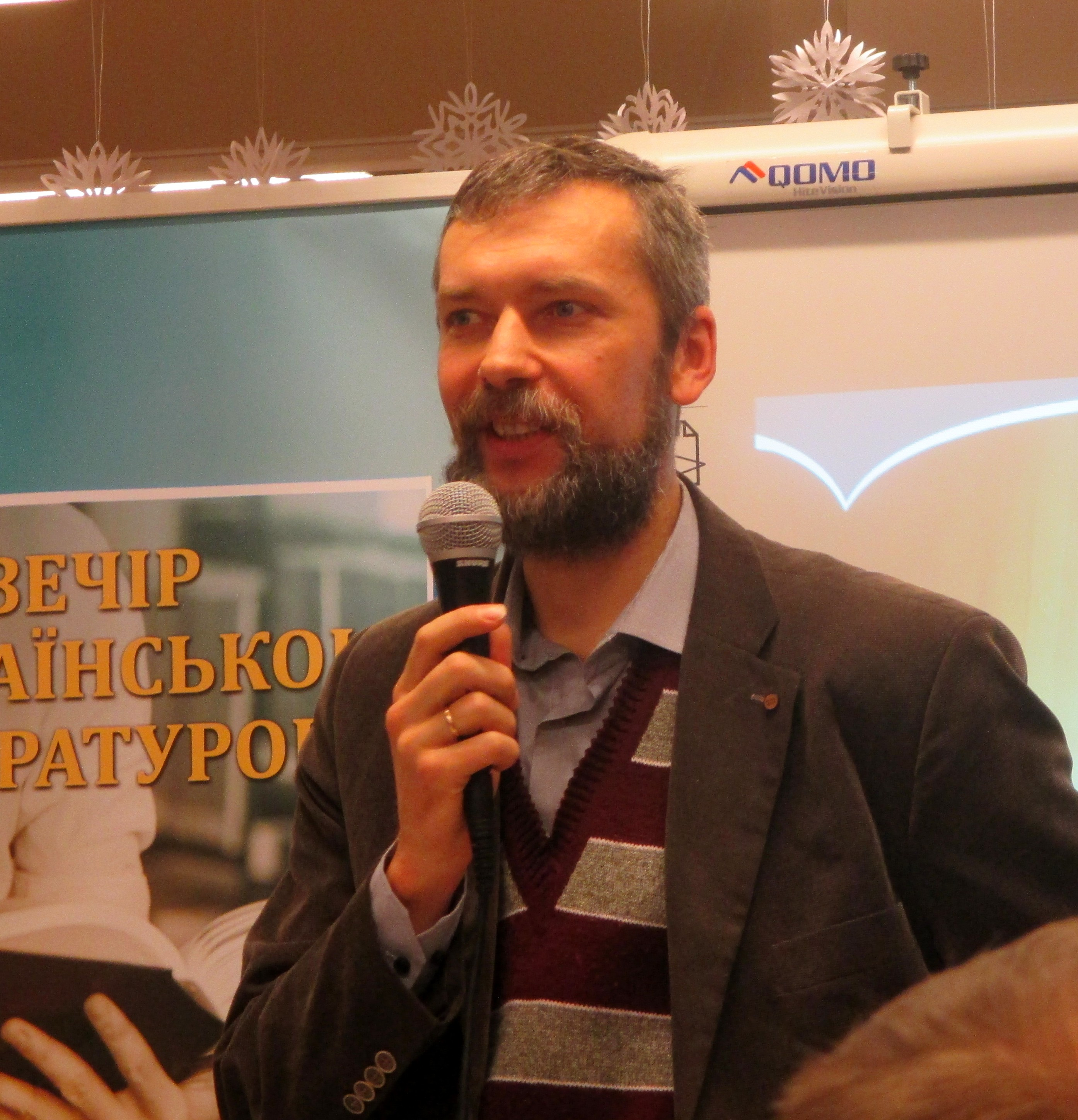 Андрій Савенець